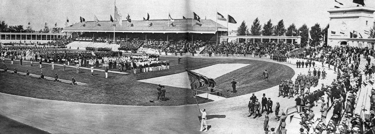 Défilé de l'équipe de Belgique aux JO d'Anvers en 1920.